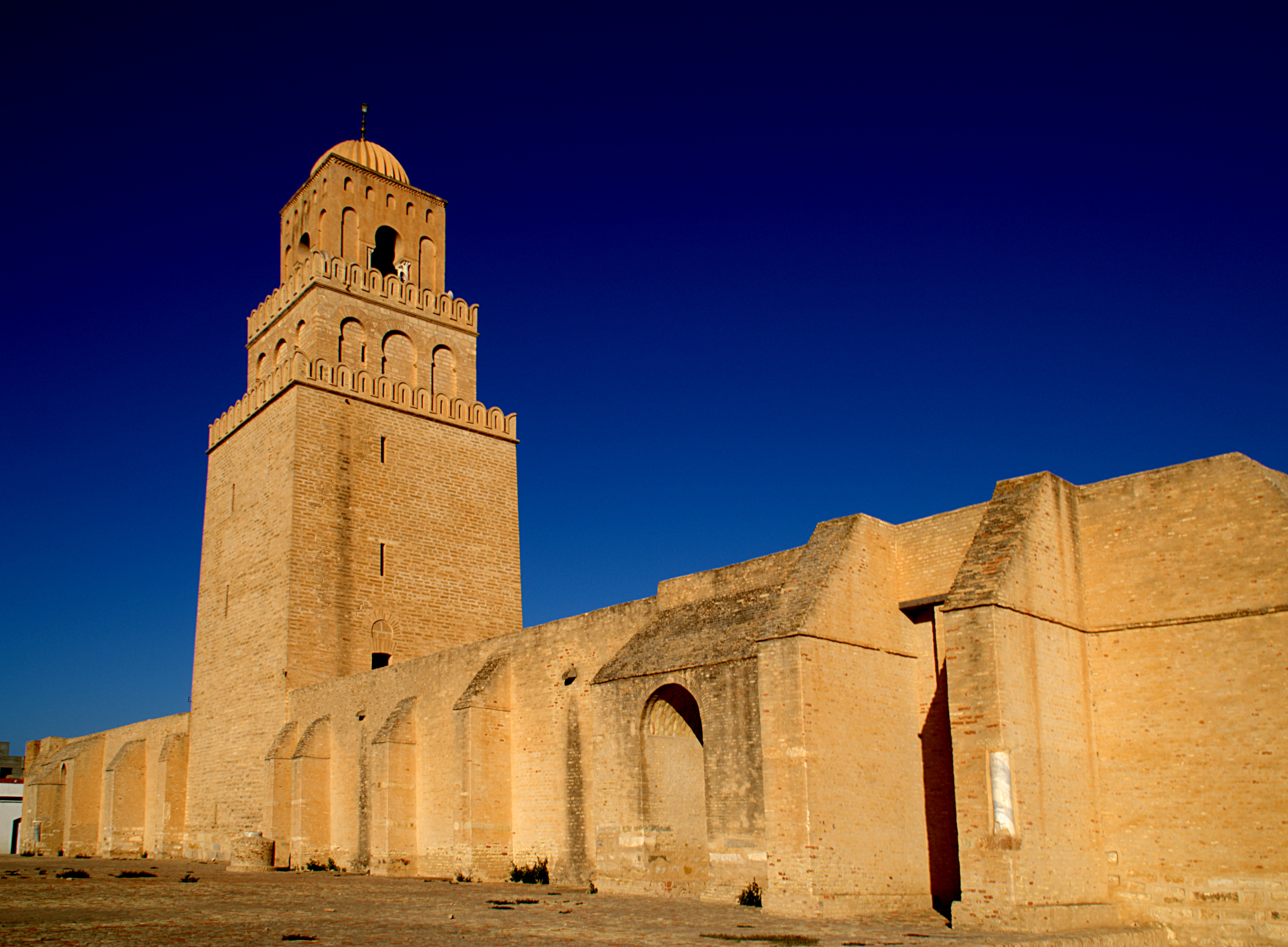 Grande Mosquée (Sidi Okba), Kairouan. Vue du minaret à trois niveaux décroissants de la Grande Mosquée de Kairouan.